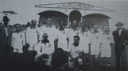 Time do Lauro Muller 1931